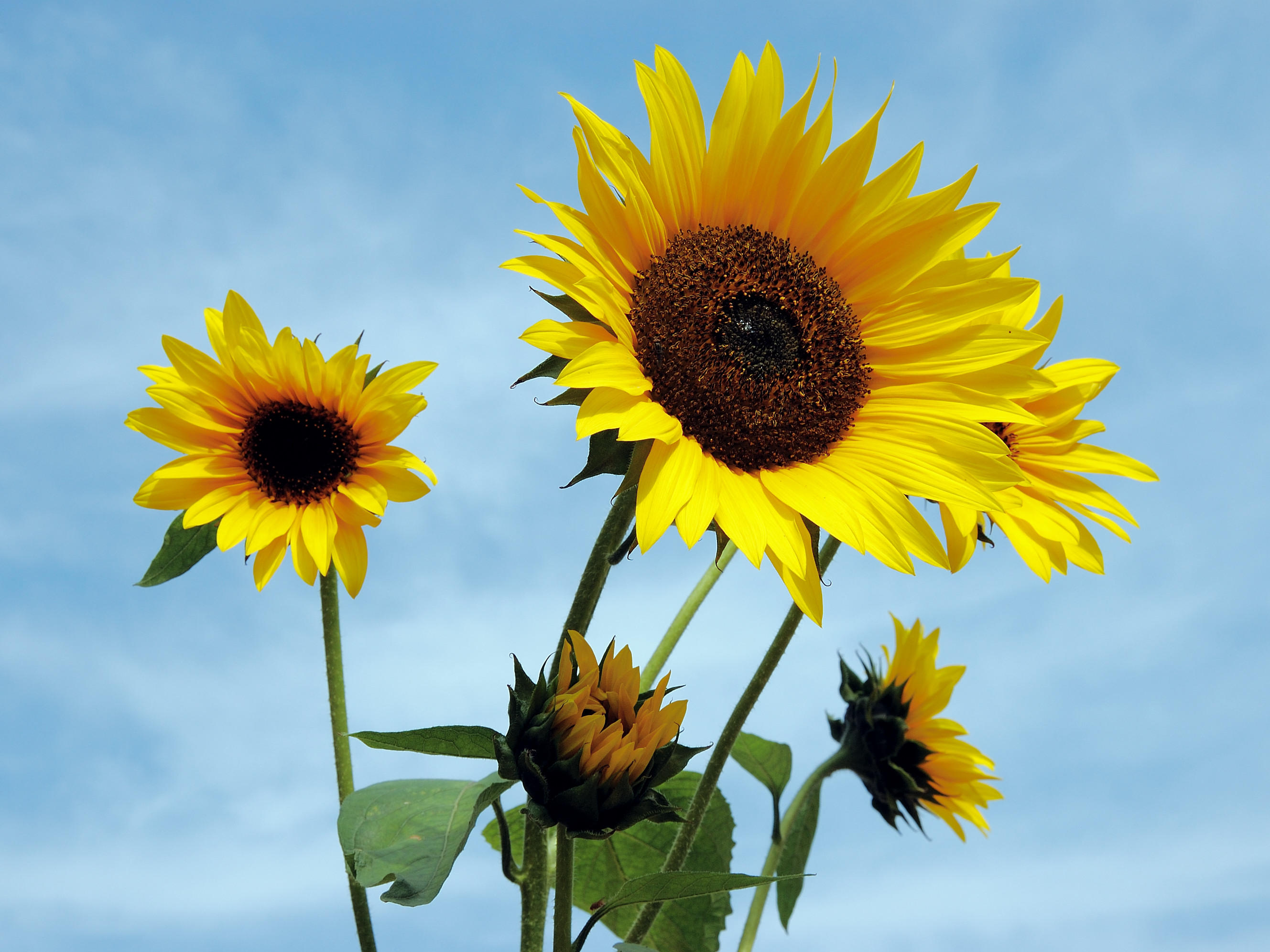 Bajouca, Portugal [2006]